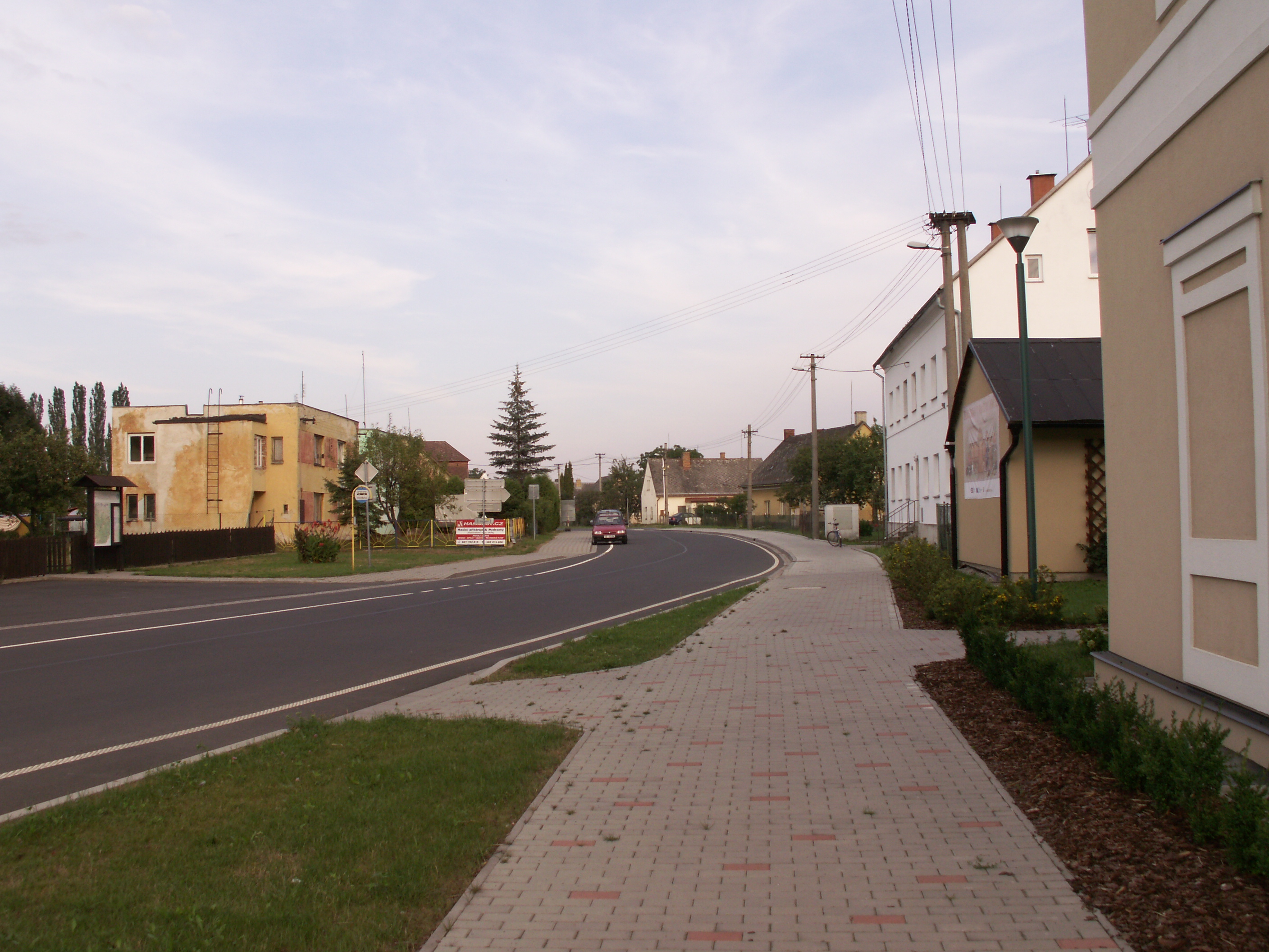 Bernartice, okres Jeseník, silnice č. 457 (směr Vidnava) za obecním úřadem